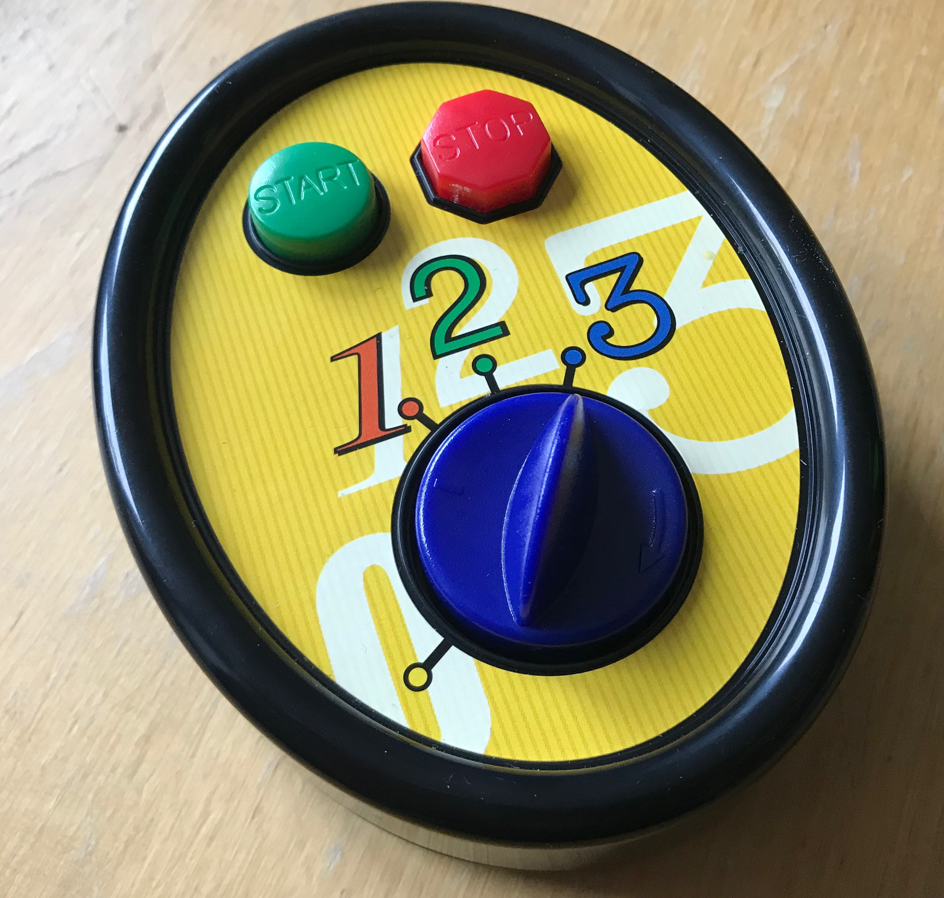 Spielmaterial des Spiels Make 'n' Break, Ravensburger 2017